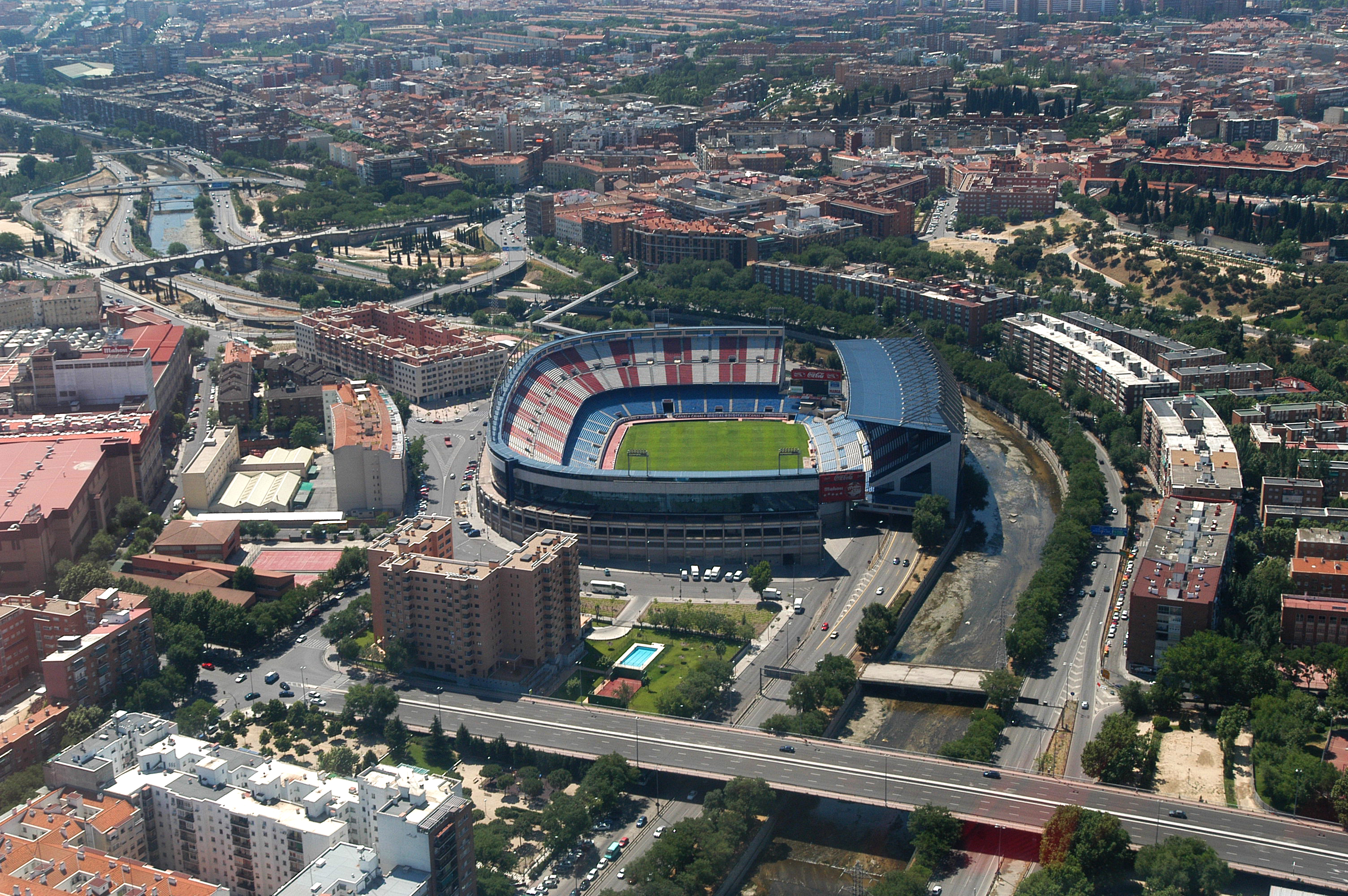 Vista del estadio Vicente Calderón en fecha indeterminada. Se aprecian la M-30 y la fábrica de Mahou